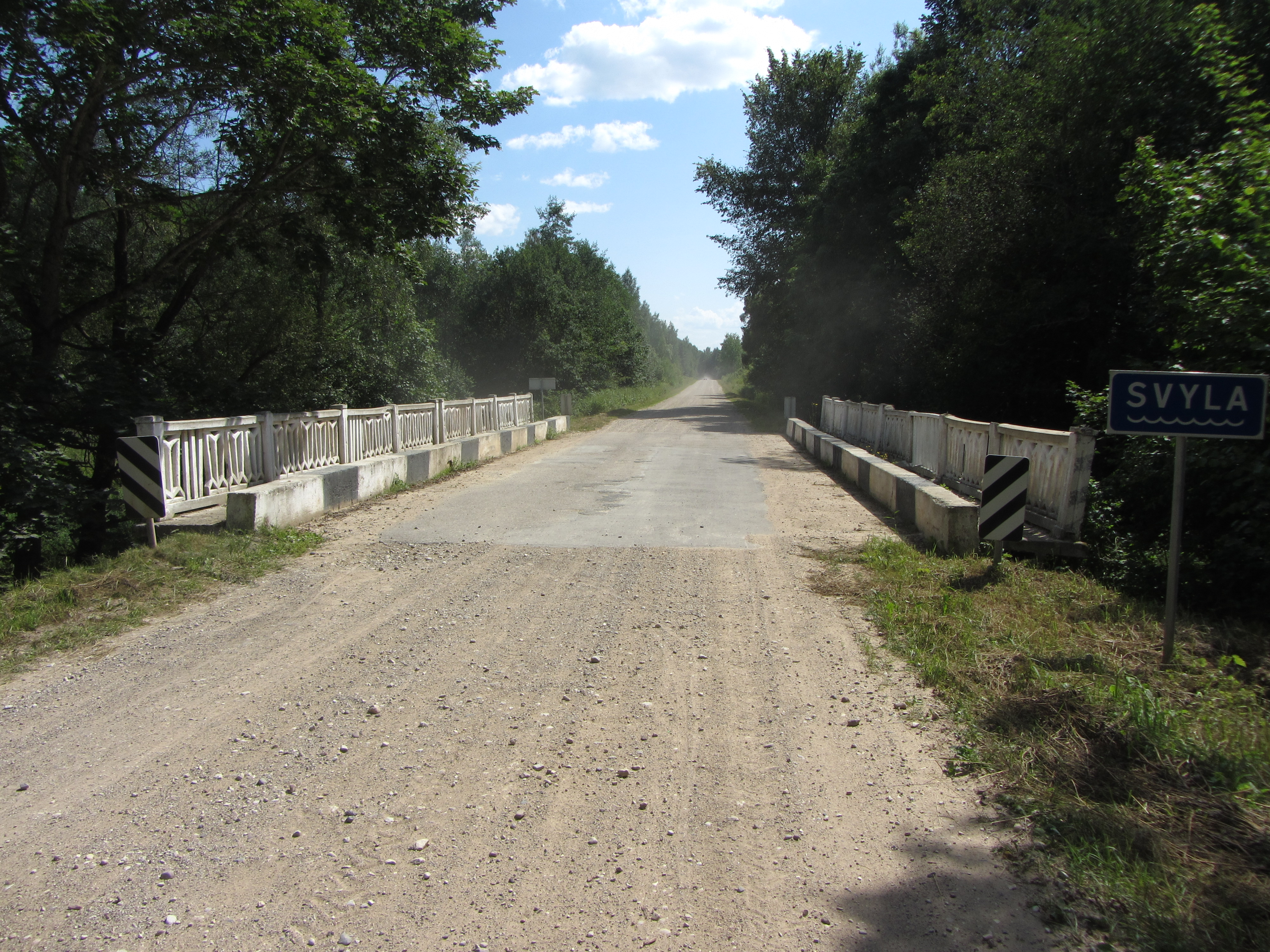 Adutiškio sen., Lithuania